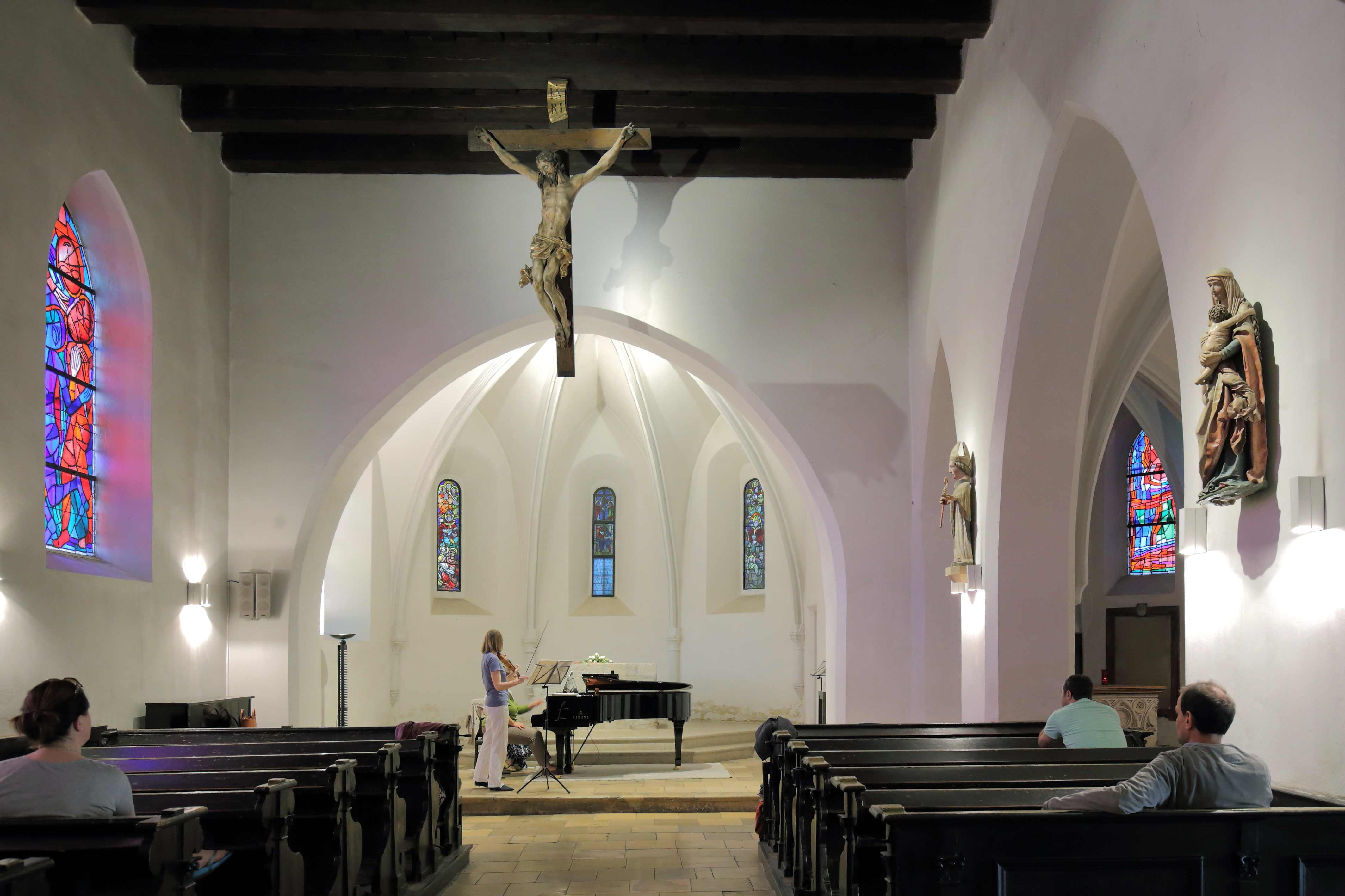 Blick vom Hauptschiff Richtung Chor in der Ruprechtskirche im 1. Wiener Gemeindebezirk Innere Stadt.Die Kirche, dem Schutzpatron der Salzschiffer heiliger Rupert geweiht, ist die älteste noch bestehende Kirche der Stadt Wien. Teile des Hauptschiffes und die Untergeschosse des Turmes stammt aus dem 11/12. Jahrhundert und der Chor aus dem 3. Viertel des 13. Jahrhunderts. Das barocke Kreuz über dem Triumphbogen ist ein Werk aus dem 1. Viertel des 18. Jahrhunderts.